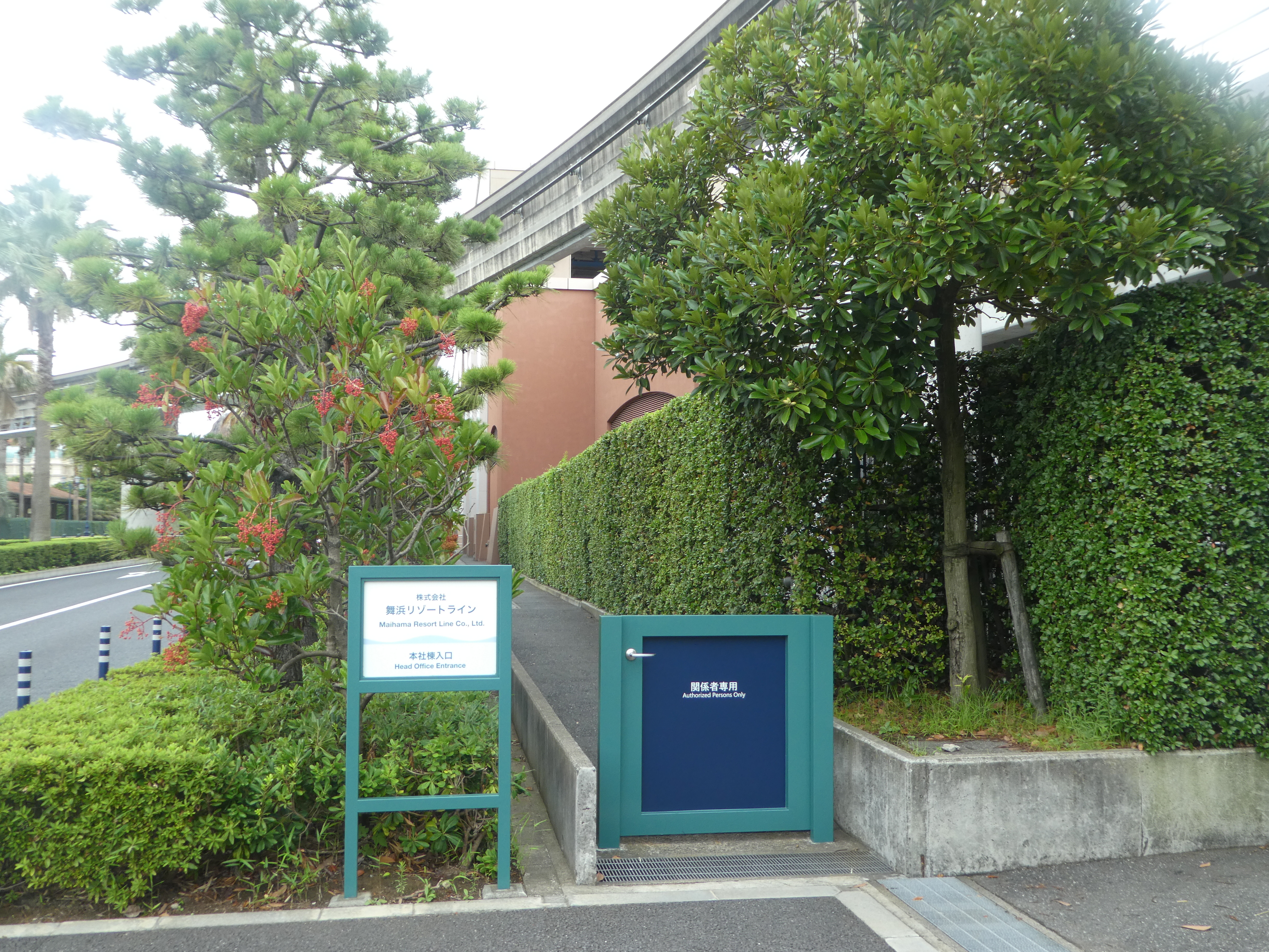 舞浜リゾートラインの本社。